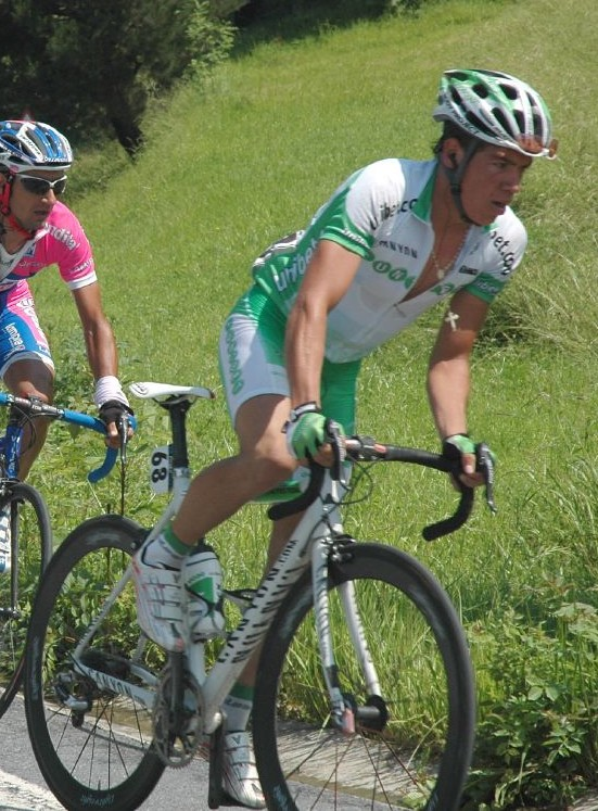 Rigoberto Urán (Euskal Bizikleta 2007).